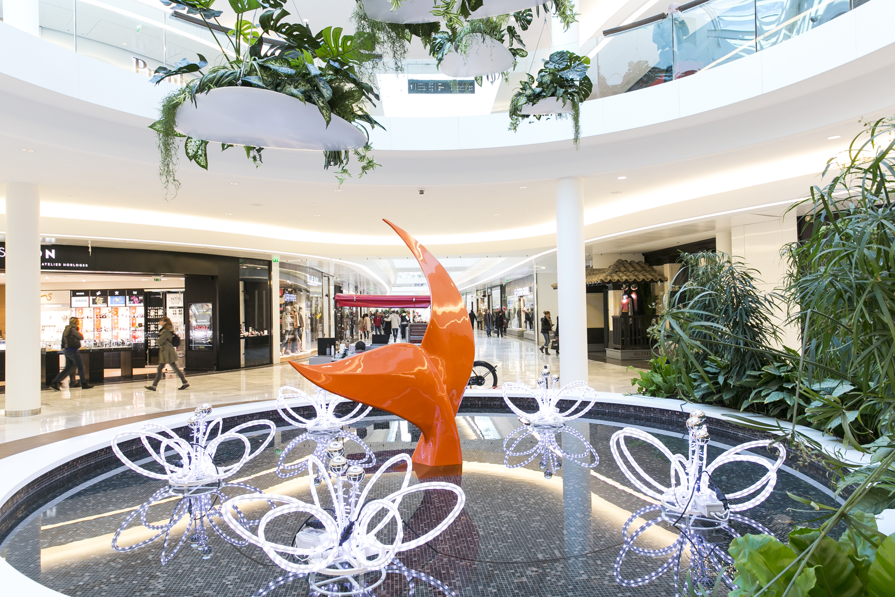 Ladino: Place végétale, près de Primark. ©Photographe Alain Potignon